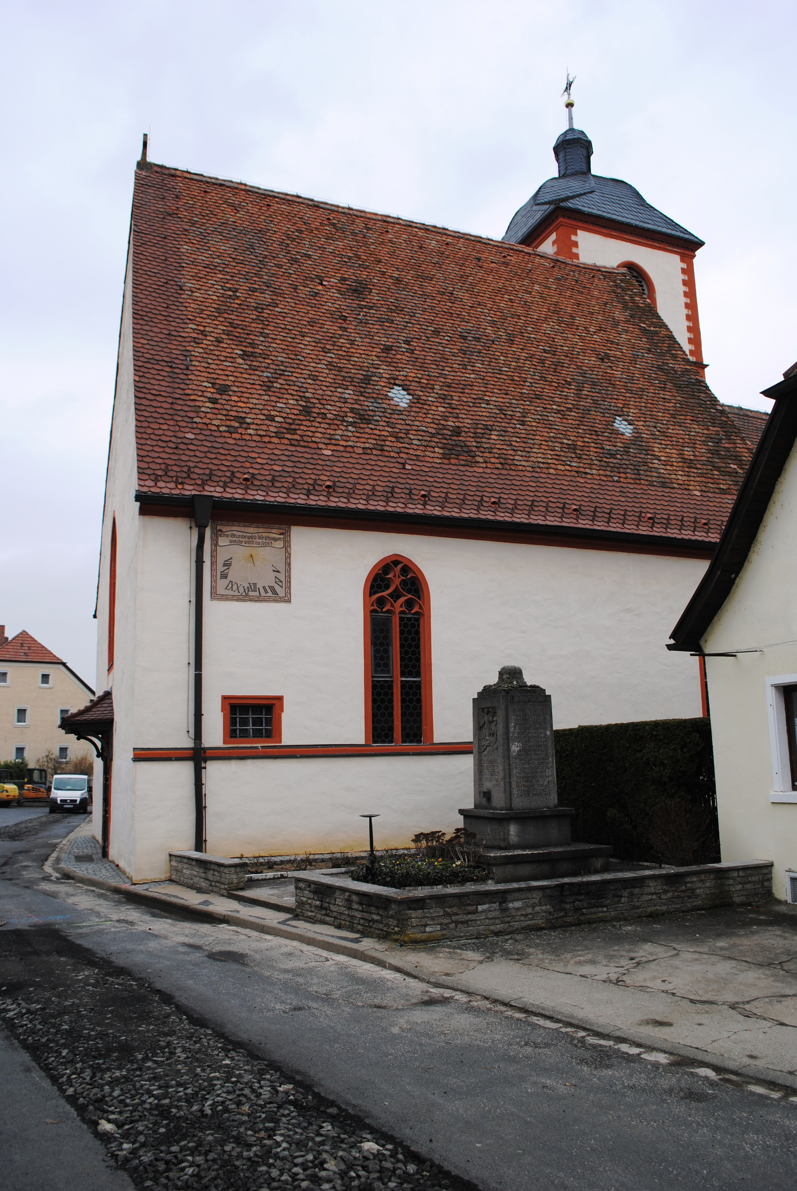 Pfarrkirche, Astheim, Volkach, spätgotische Anlage, 2. H. 15. Jahrhundert, Langhaus 1775 verändert